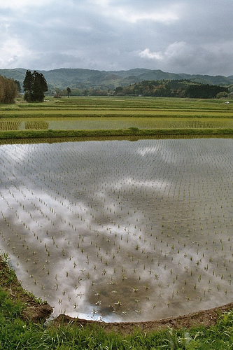 Le riz, tout juste planté, non loin de l'auberge de jeunesse Green Village sur l'ile de Sado. Mai 2006